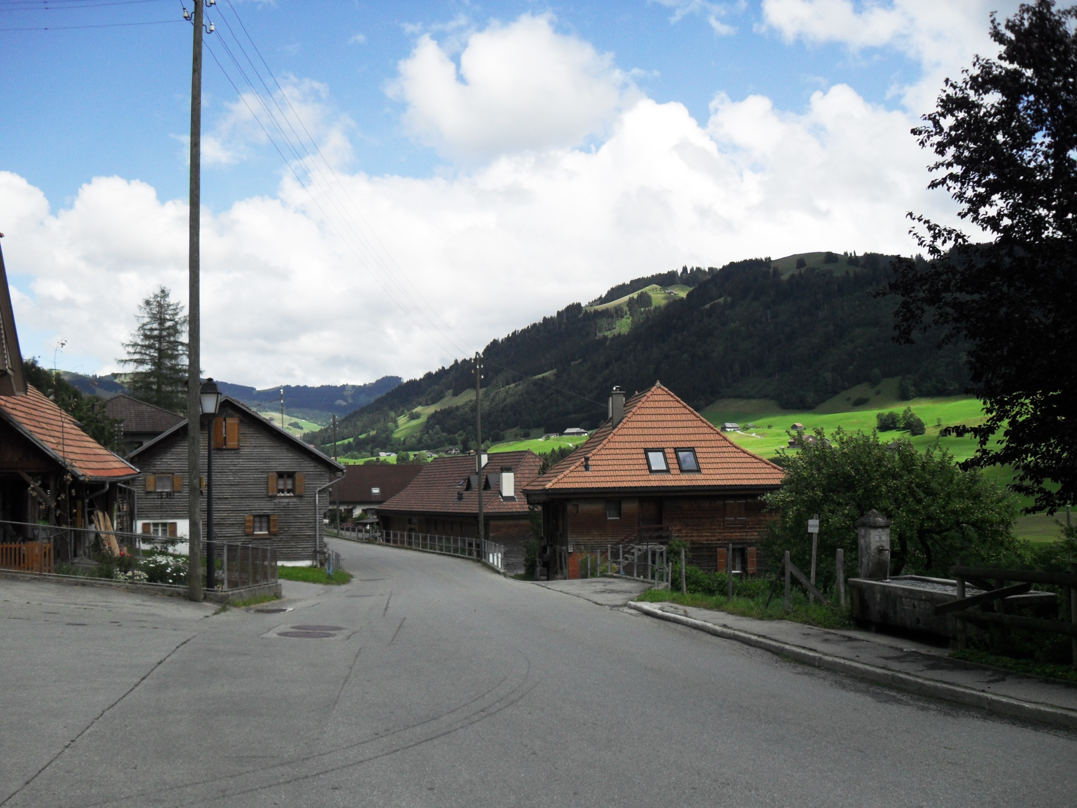 Centre du village de Cerniat Object location46° 38′ 04.06″ N, 7° 09′ 34.86″ E